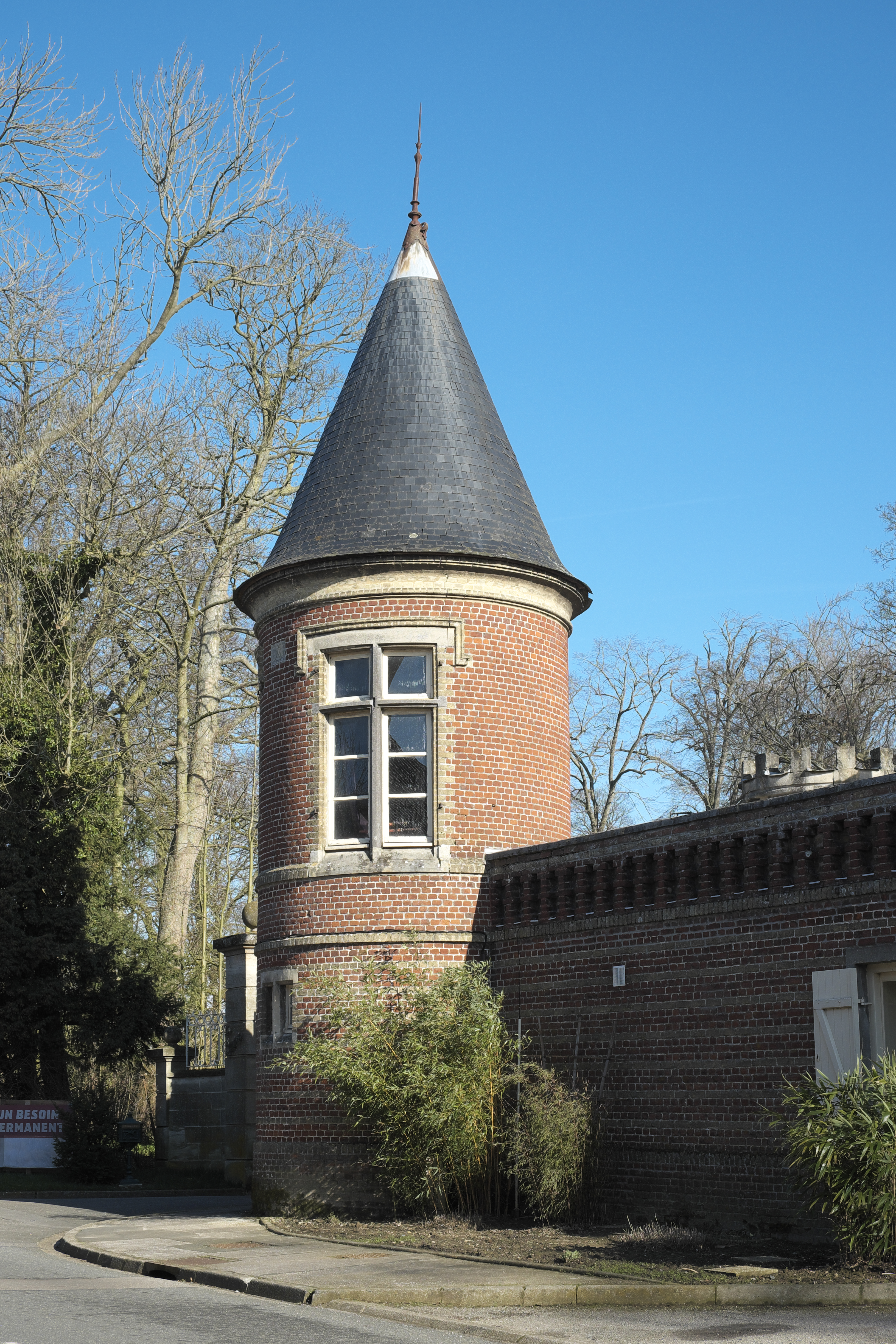 Château de la Briarde in West-Cappel im Département Nord (Nord-Pas-de-Calais/Frankreich) .